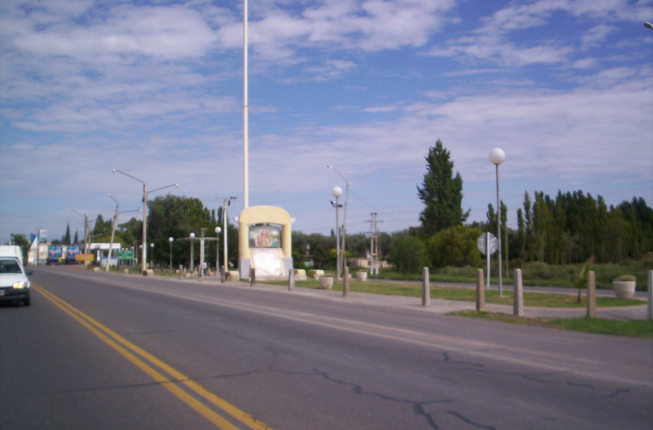 Vista del monumento que da la bienvenida al departamento Santa Lucía por Ruta Nacional 20, donde nace la avenida Hipólito Yrigoyen, en la provincia de San Juan Argentina